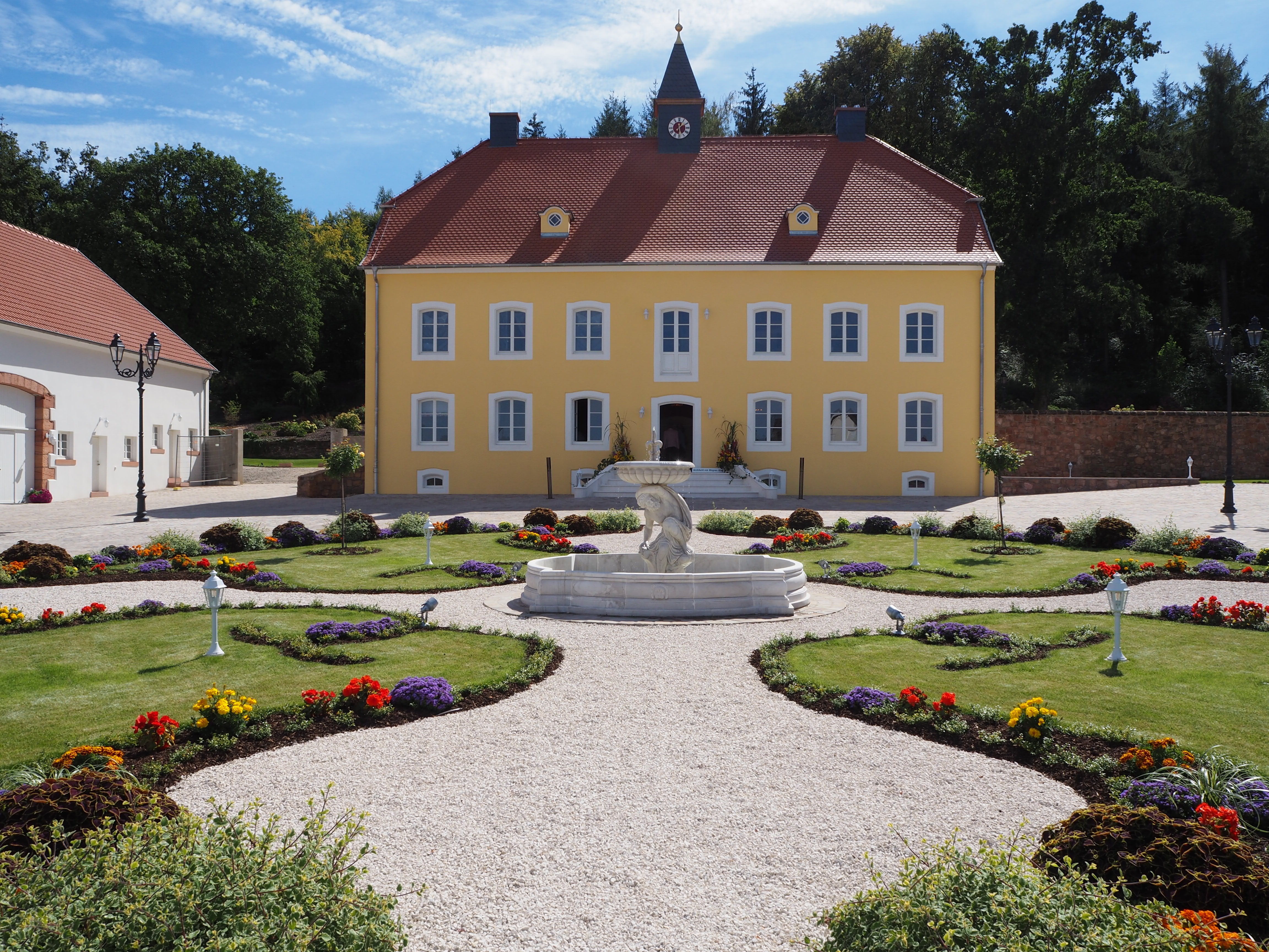 Herrenhaus des Guts Königsbruch nach der Sanierung